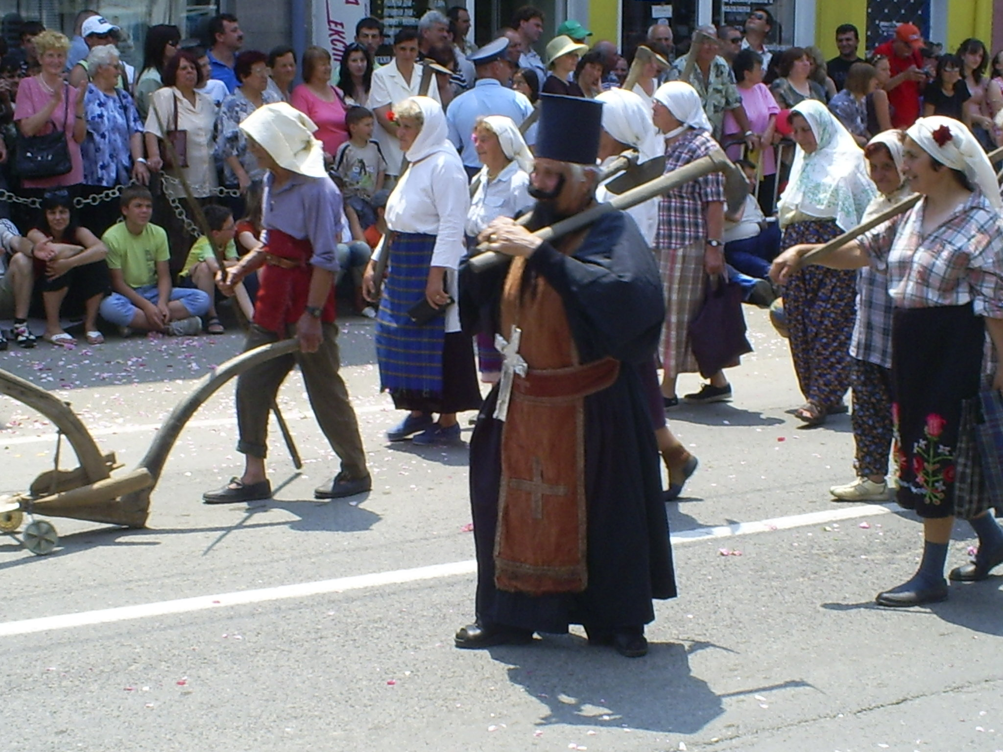 kazanluk(BULGARIA)